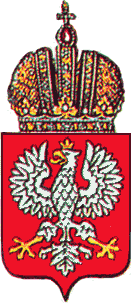 Герб царства Польского